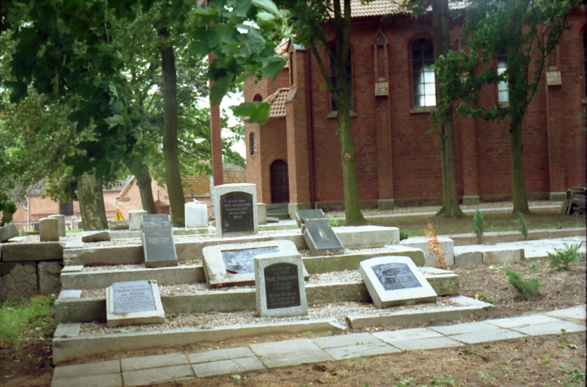 Bruskowo Wielkie, cemetary